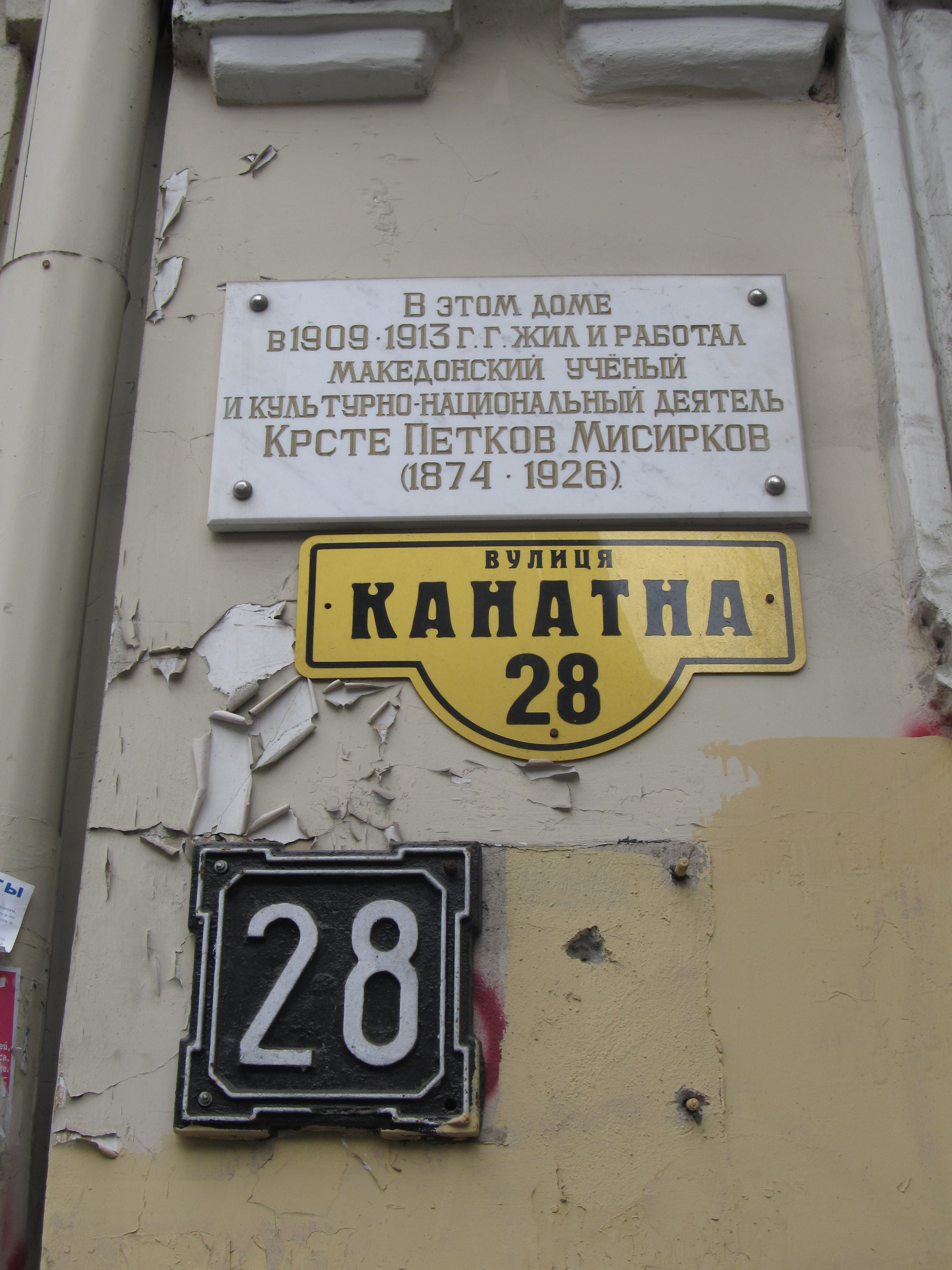 Памятная доска на доме по ул. Канатная 28, в Одессе ,в котором жил Кръсте Мисирков